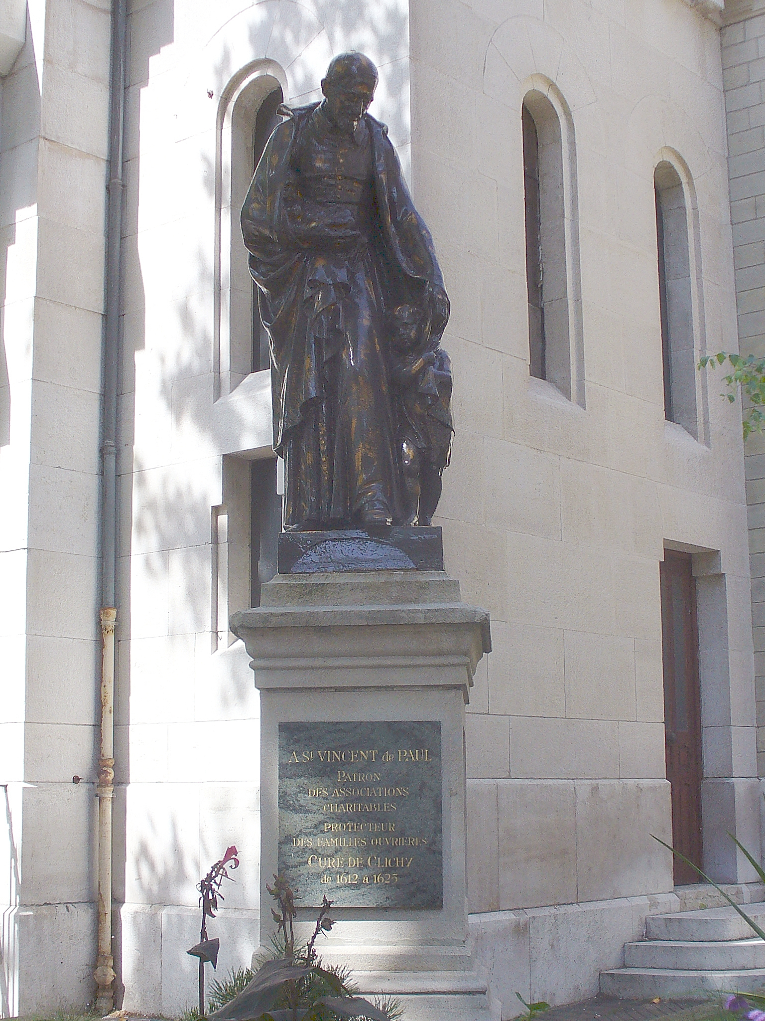 Statue de Saint-Vincent de Paul à Clichy (Hauts de Seine)